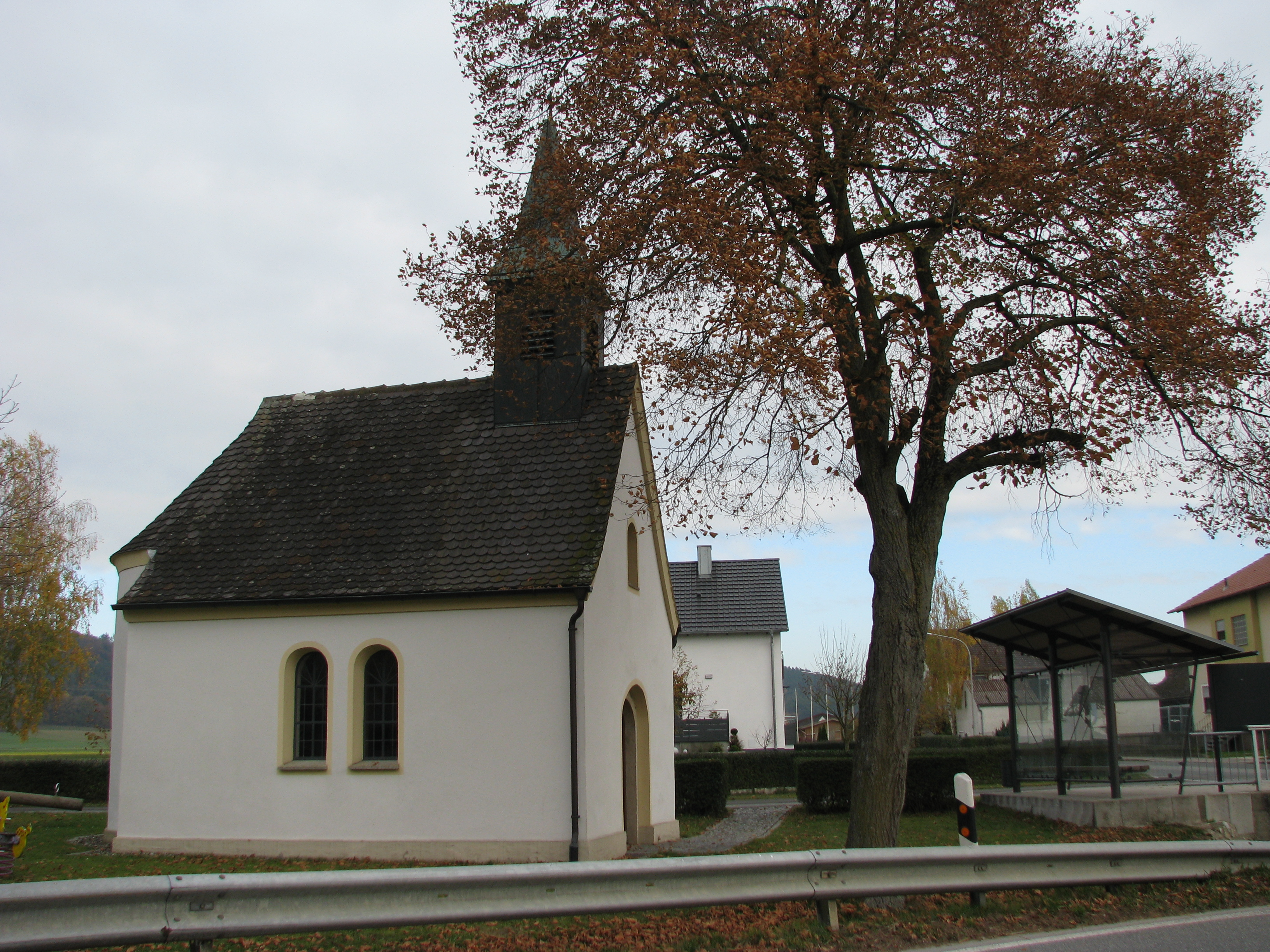 Höfen, Ortsteil von Freystadt im Landkreis Neumarkt in der Oberpfalz, Ortskapelle